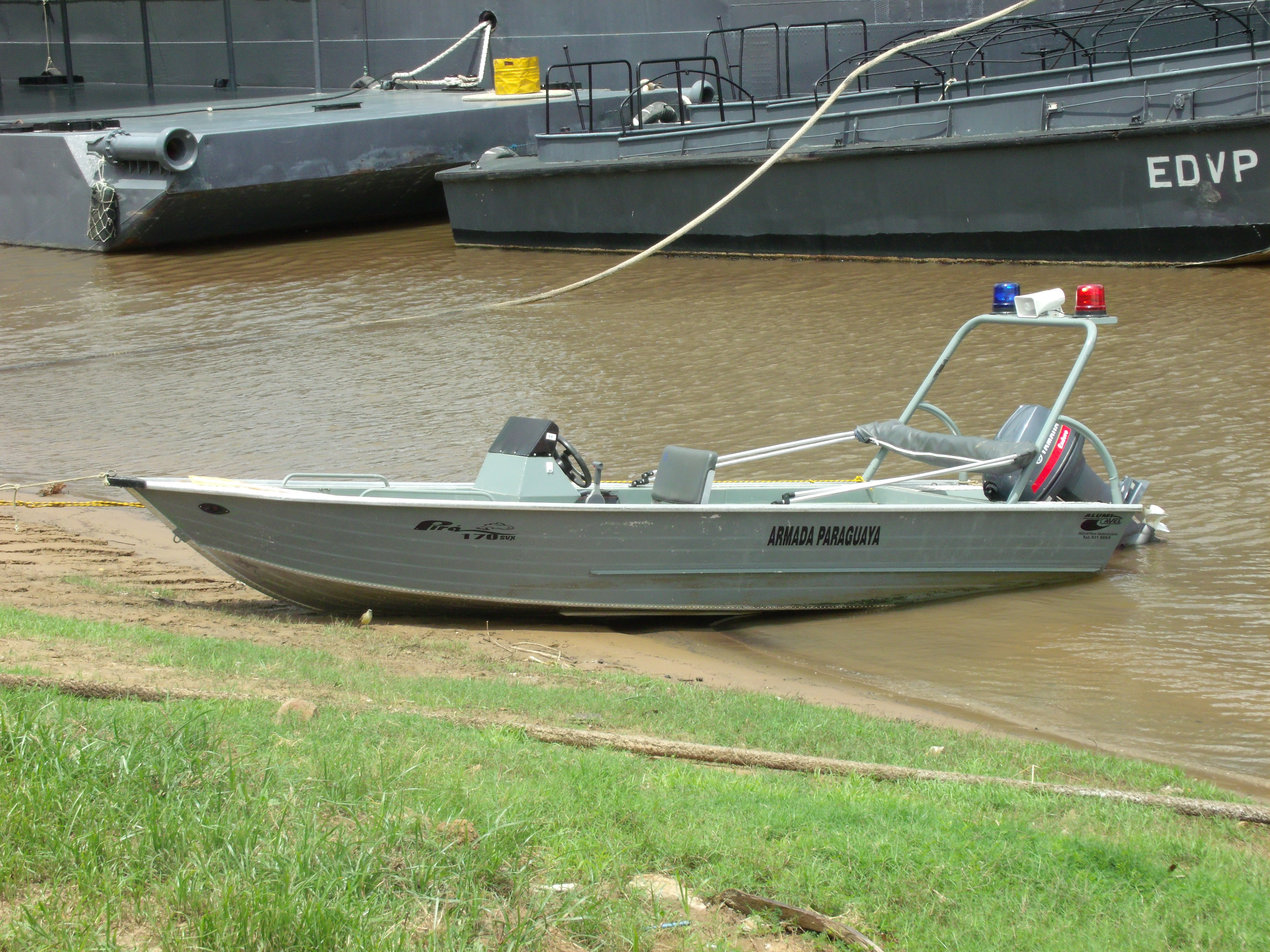 Lancha rápida Pirá 170, Armada del Paraguay.